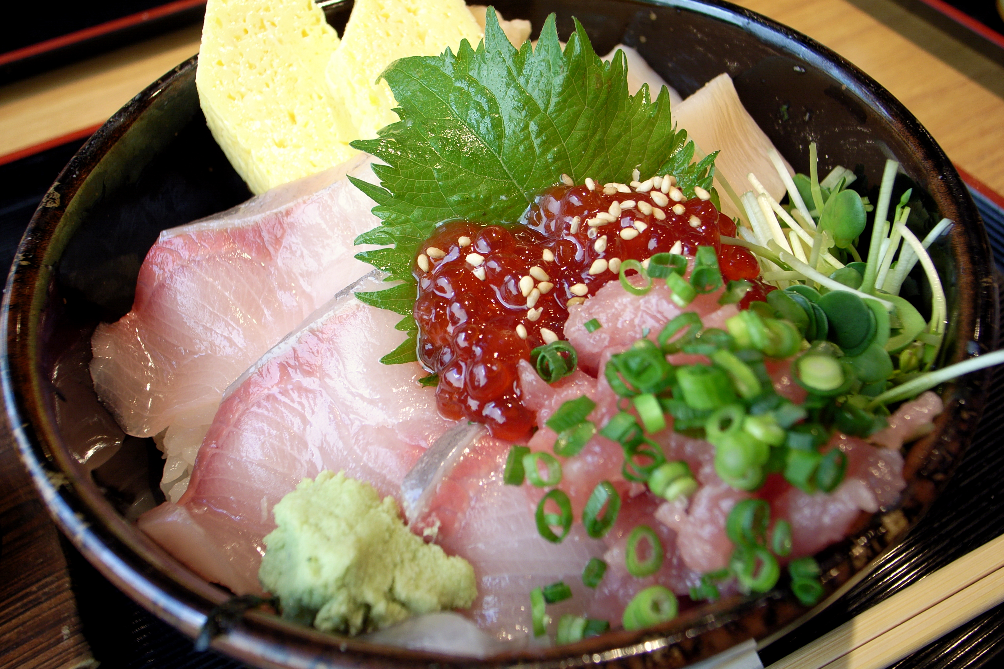 Chirashizushi in a donburi bachi